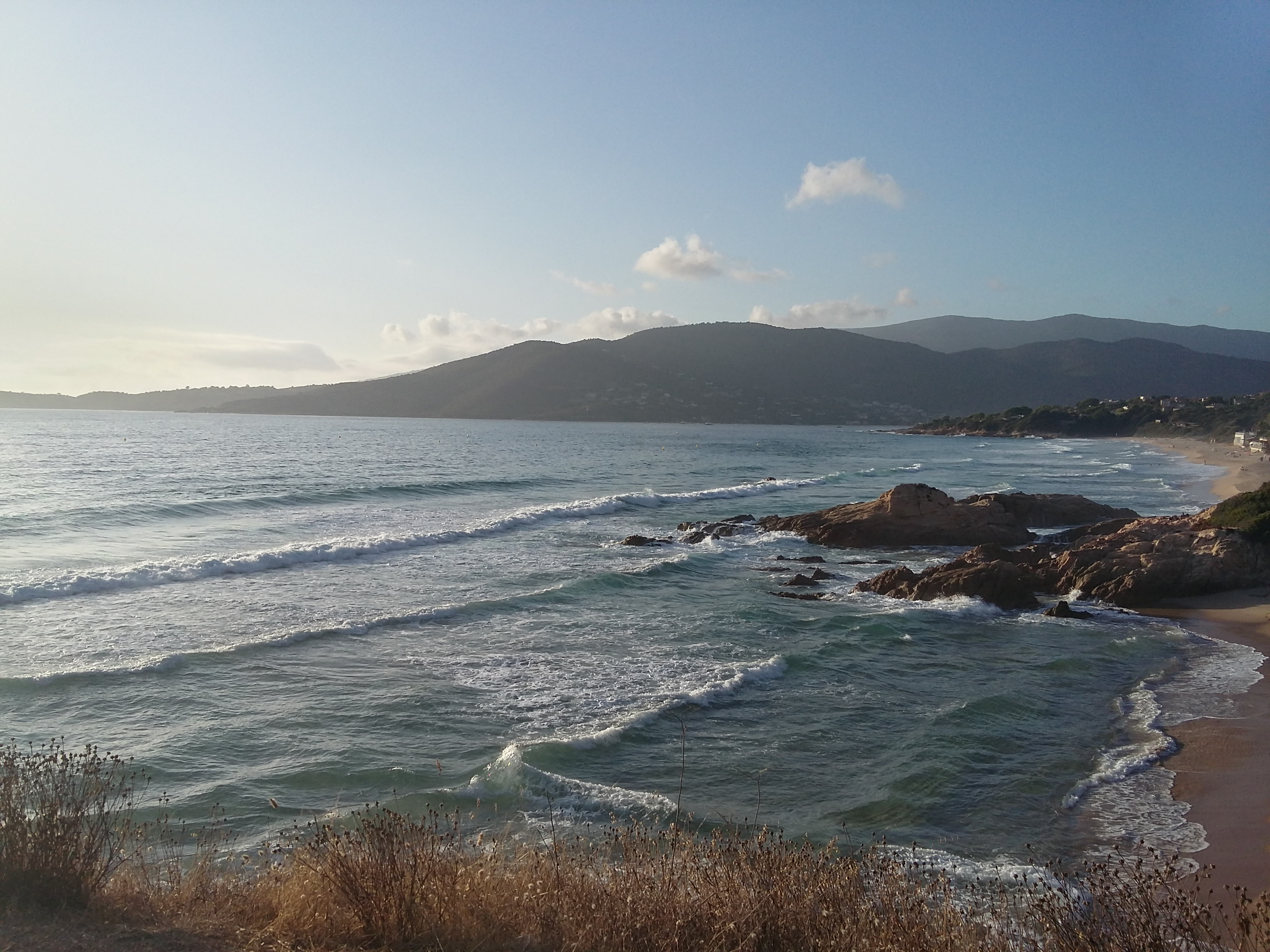 Plage d'Esigna, Coggio